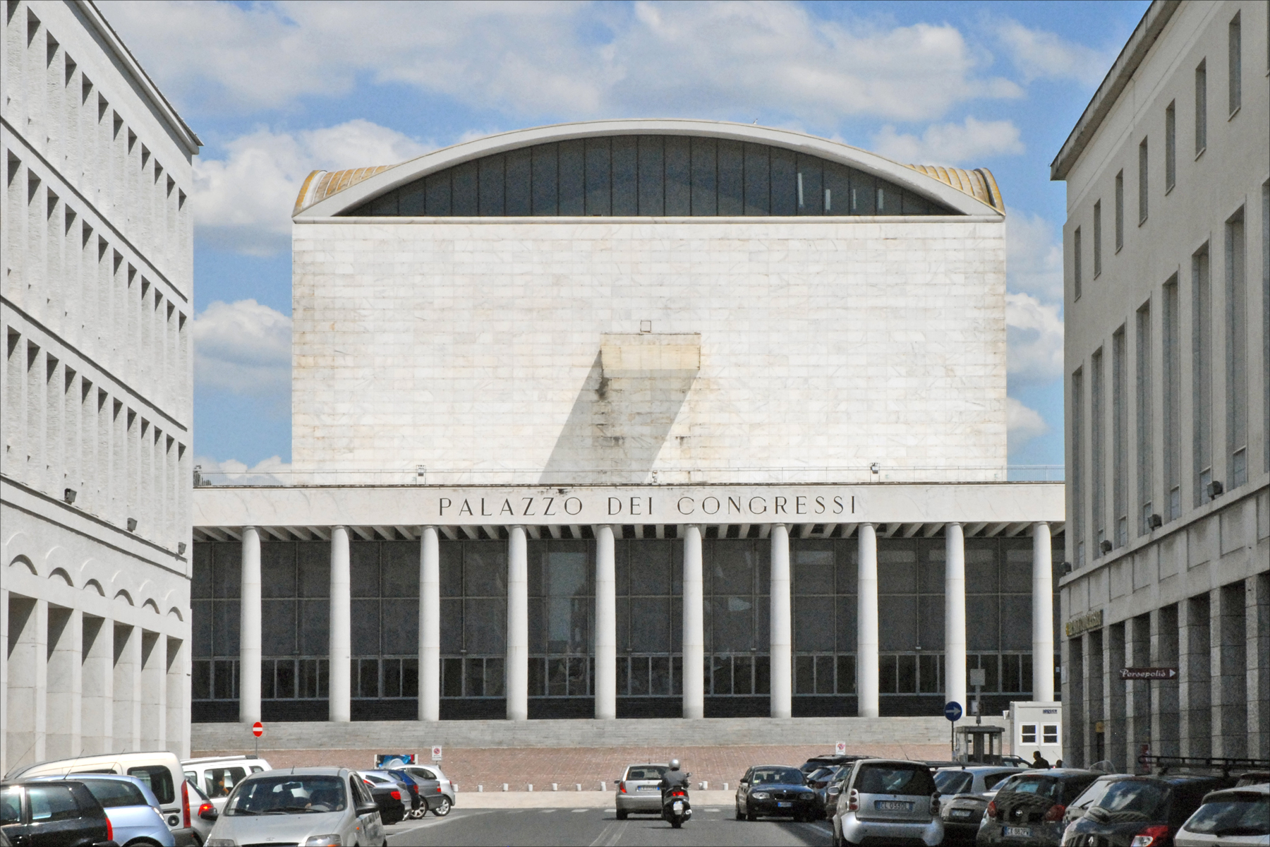 Le Palais des Congrès (vue arrière) Ce bâtiment a été conçu par l'architecte rationaliste Adalberto Libera en 1938. De l'autre coté, il est précédé d'un vaste portique.d'où émerge la partie centrale sous forme de cube dont l'arrière est visble sur la photographie. Un nouveau palais des congrès conçu par l'architecte Massimiliano Fuksas est en cours de construction quelques rues plus loin. ___________ La création du nouveau quartier de Rome, appelé EUR : Esposizione Universale di Roma, a été décidée en 1936 par Benito Mussolini (1883-1945) pour célébrer le 20ème anniversaire de la marche sur Rome par une Exposition Universelle qui devait se tenir en 1942. Quelques bâtiments ont été construits mais les travaux d'aménagement et de construction ont été stoppés par la guerre. Les architectes chargés du projet étaient : Marcello Piacentini entouré de Giuseppe Pagano, Luigi Piccinato, Ettore Rossi, Luigi Vietti. Les travaux ont repris en 1951 avec l'ambition de faire de l'EUR un quartier d'affaires associé à une zone urbaine d'habitation reliée par le métro à Rome et par le train à Ostie.